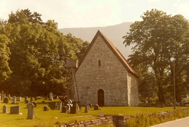 Sankt Jetmund kirke